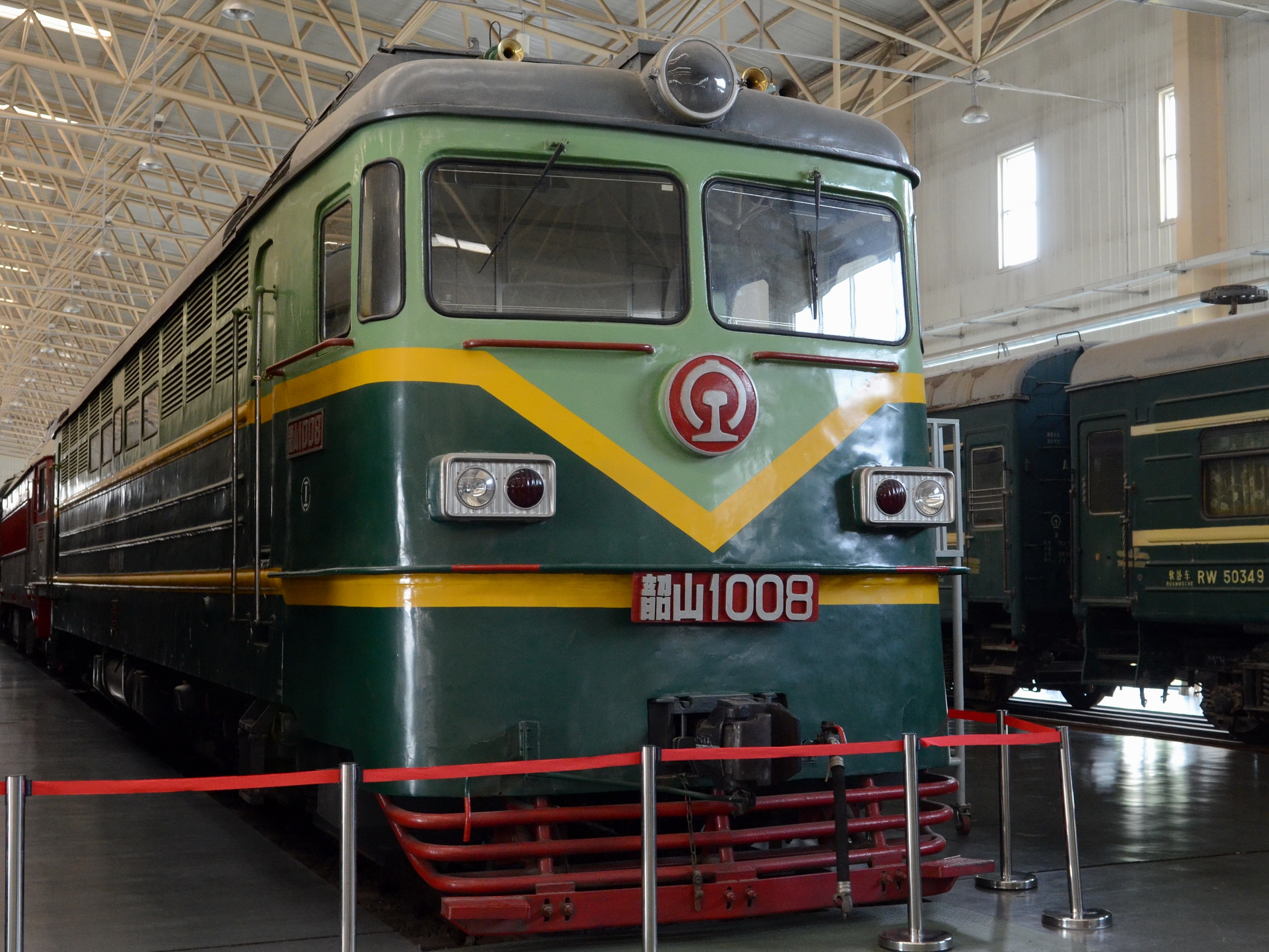 韶山1型008号车是首台量产韶山1型机车，保存在中国铁道博物馆